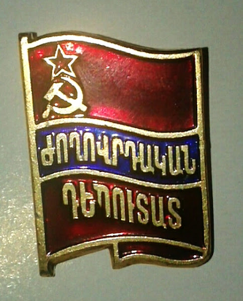 蘇聯亞美尼亞蘇維埃代表證章